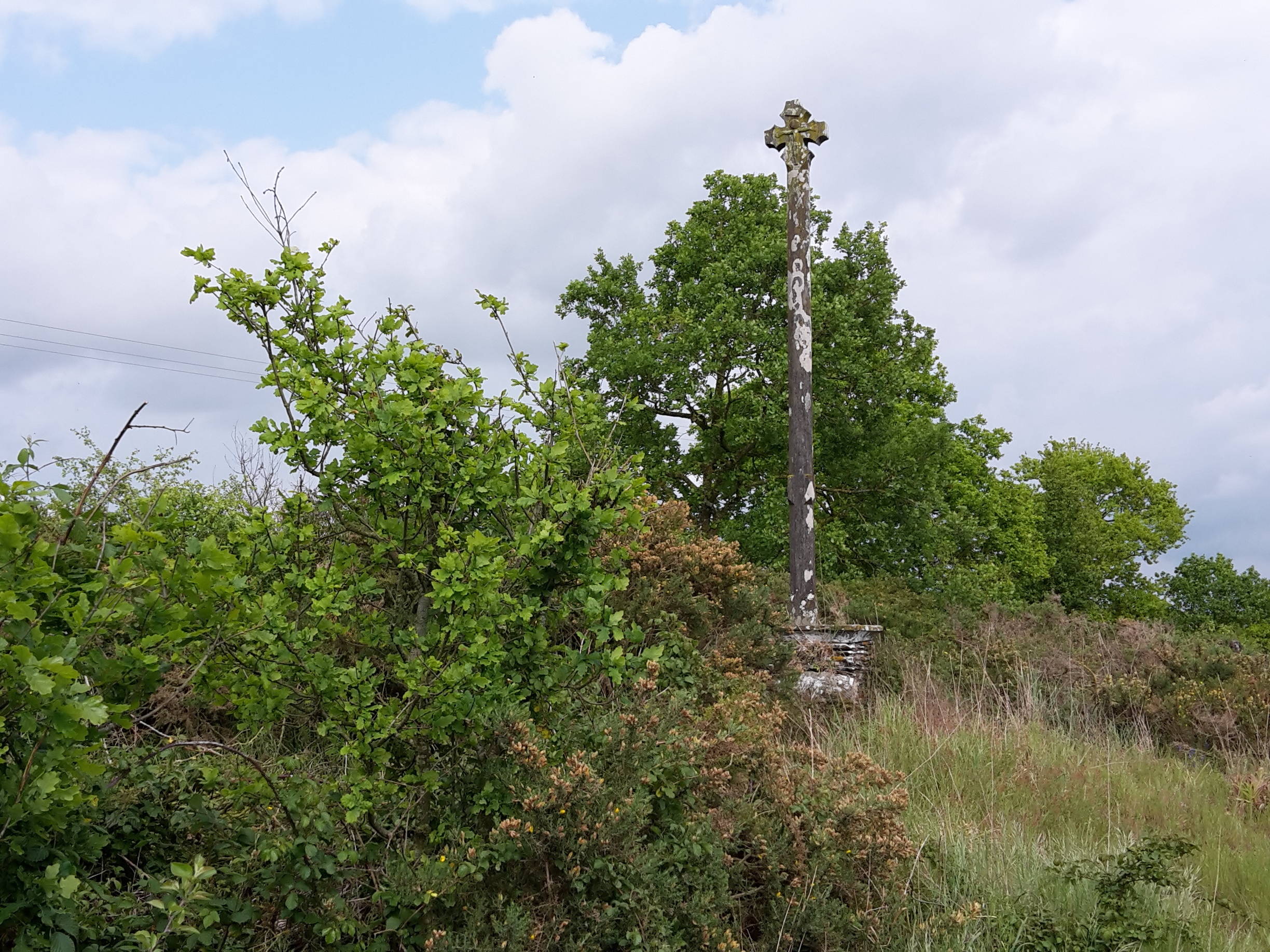 Croix du Bon Conseil, Le Pin, Loire-Atlantique, France.